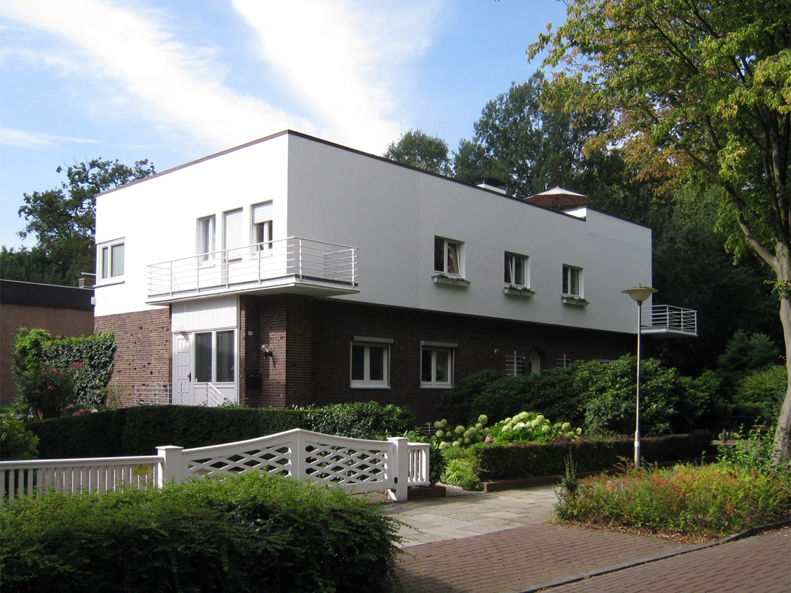 Haus Wenhold in Bremen, Unter den Eichen 14, 16 / Riensberger Straße.Das abgebildete Objekt ist ein geschütztes Kulturdenkmal in der Freien Hansestadt Bremen, mit der Nr. 1182 beim Landesamt für Denkmalpflege registriert.